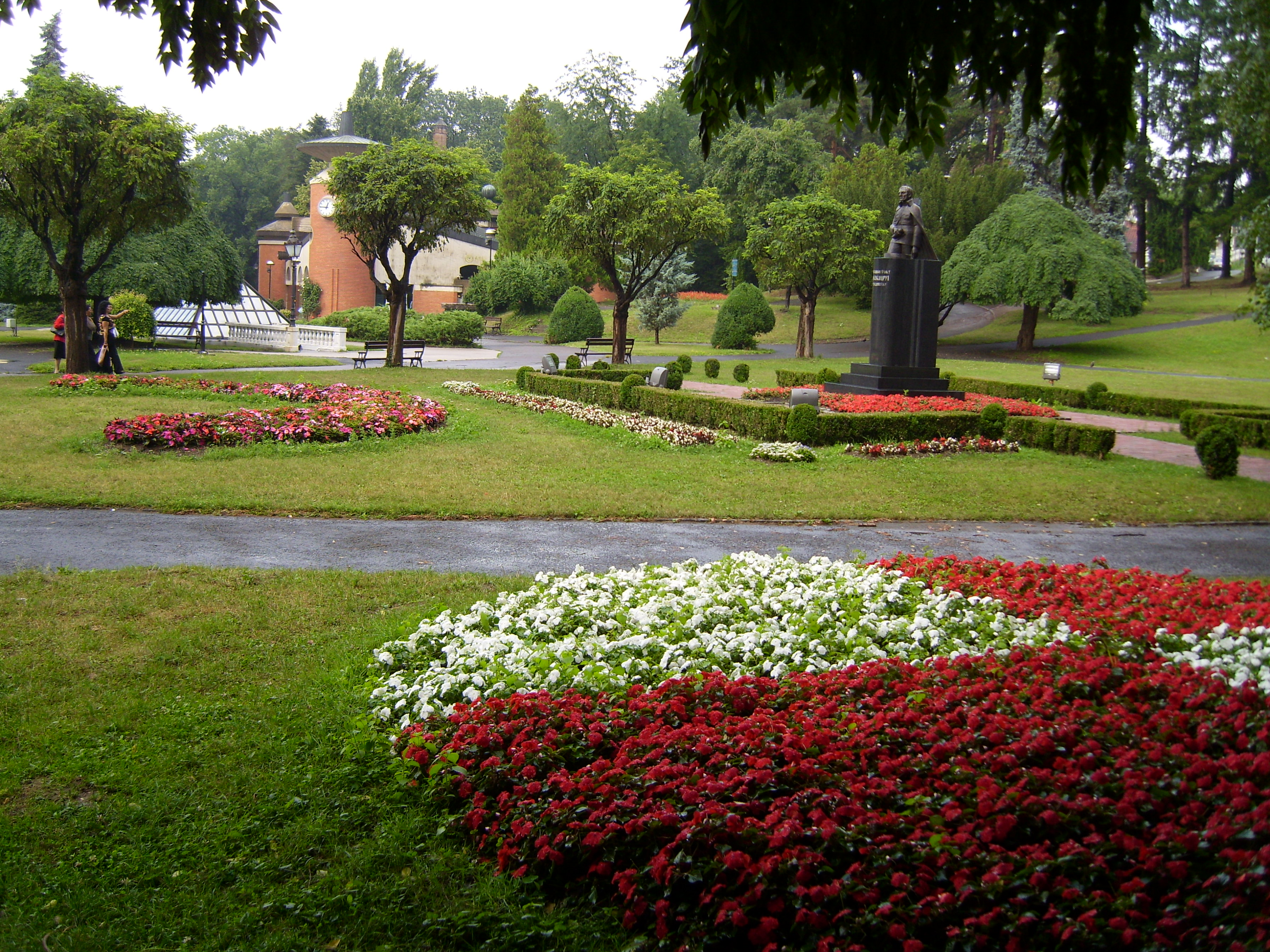 Vrnjačka Banja - centralni park